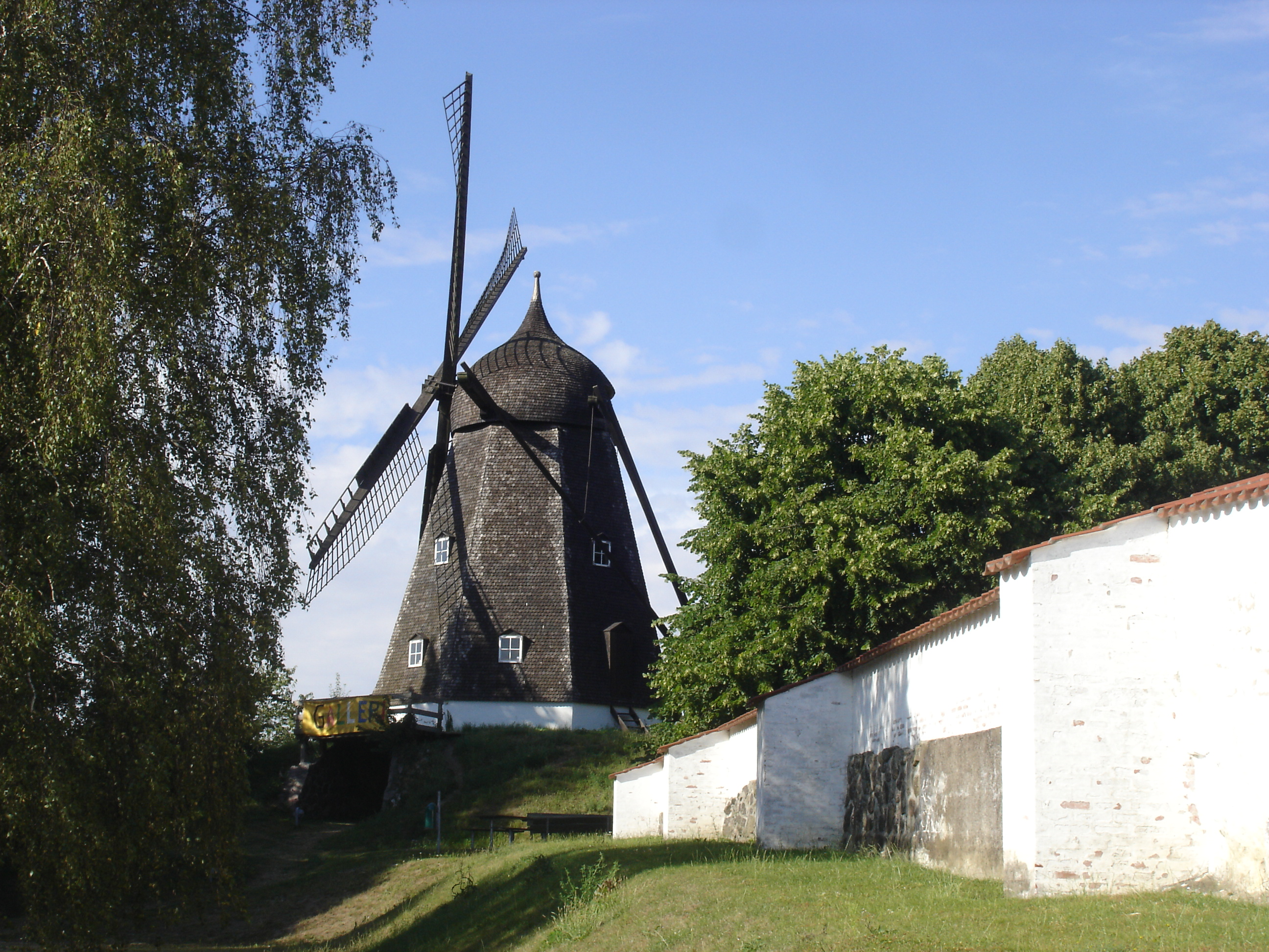 Karrebæk Mølle